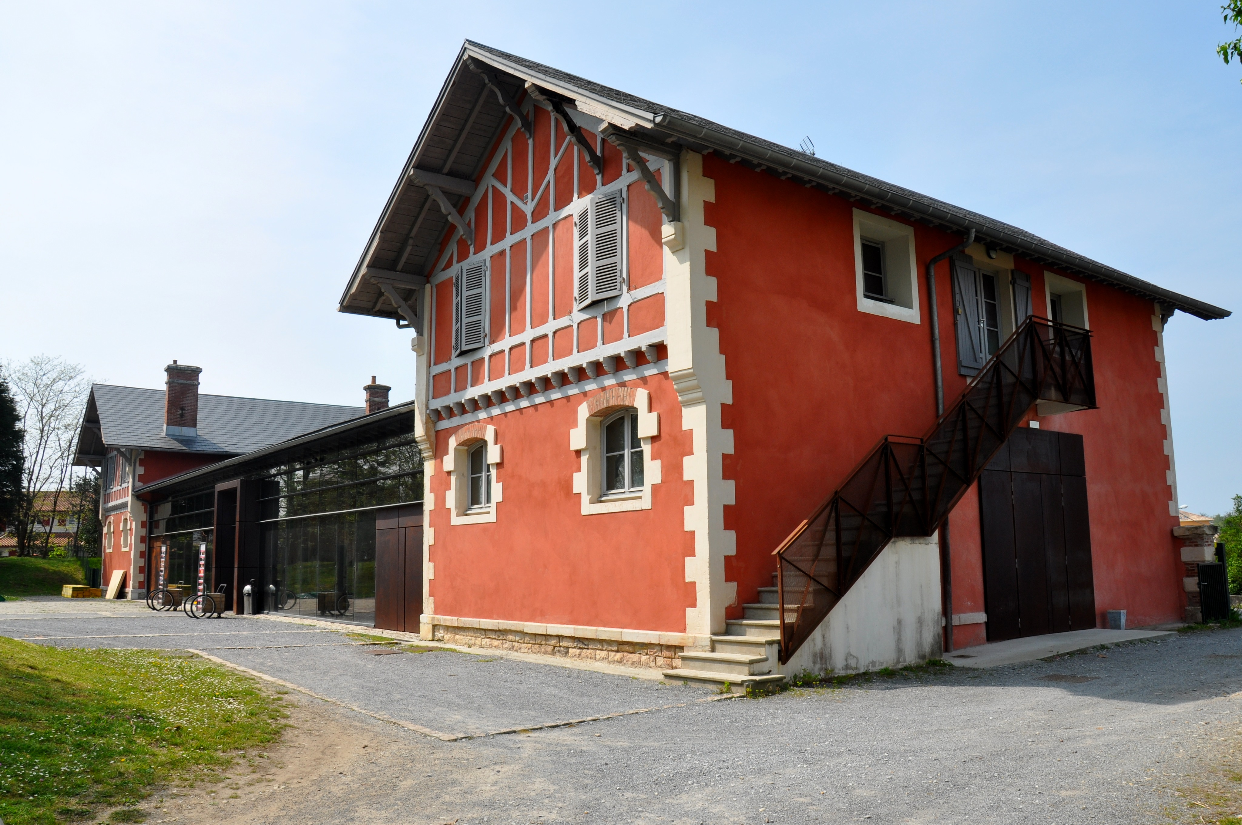 Ecuries de Baroja - Anglet